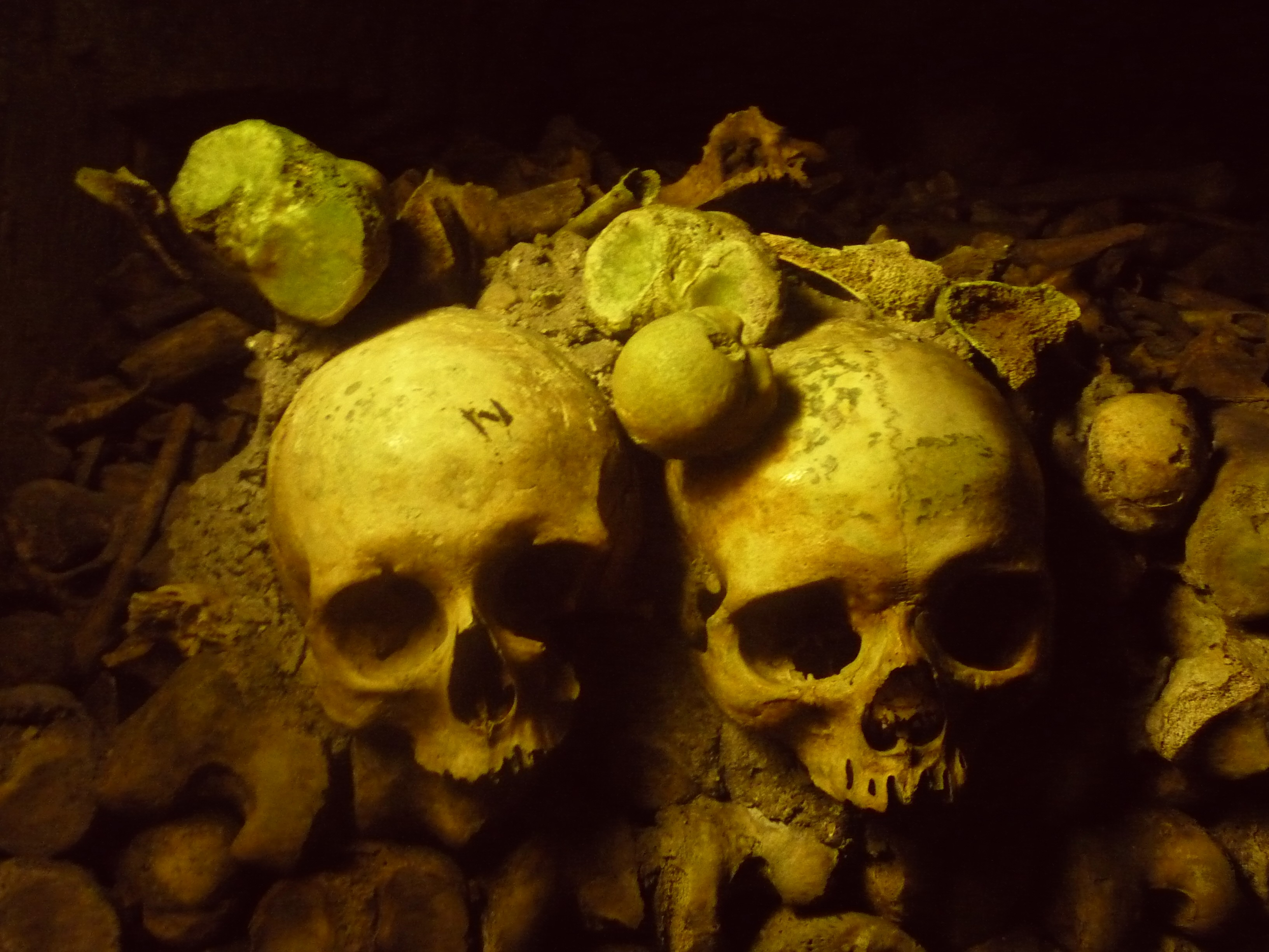 Muraille de crânes, Catacombes de Paris